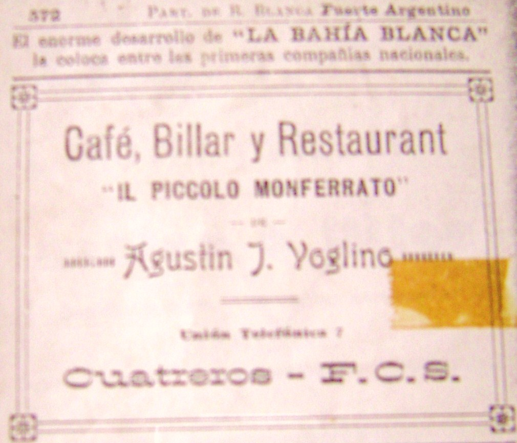 Publicidad de la Guía Comercial y Telefónica del Pueblo de Cuatreros